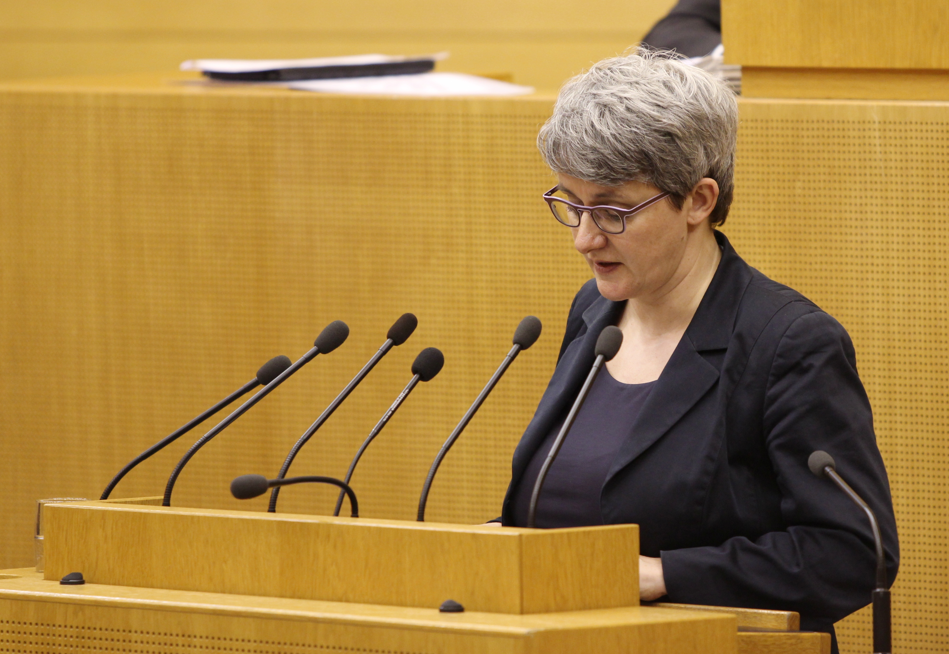 Silke Krebs im Plenarsaal des Landtages von Baden-Württemberg. Wikipedia im Landtag – Baden-Württemberg 15.–16. Mai 2013 in Stuttgart Fragen zur Nachnutzung Wenn Sie Fragen zur Nachnutzung dieses Bildes haben, können Sie sich jederzeit gern an wenden Personality rights warningAlthough this work is freely licensed or in the public domain, the person(s) shown may have rights that legally restrict certain re-uses unless those depicted consent to such uses. In these cases, a model release or other evidence of consent could protect you from infringement claims.